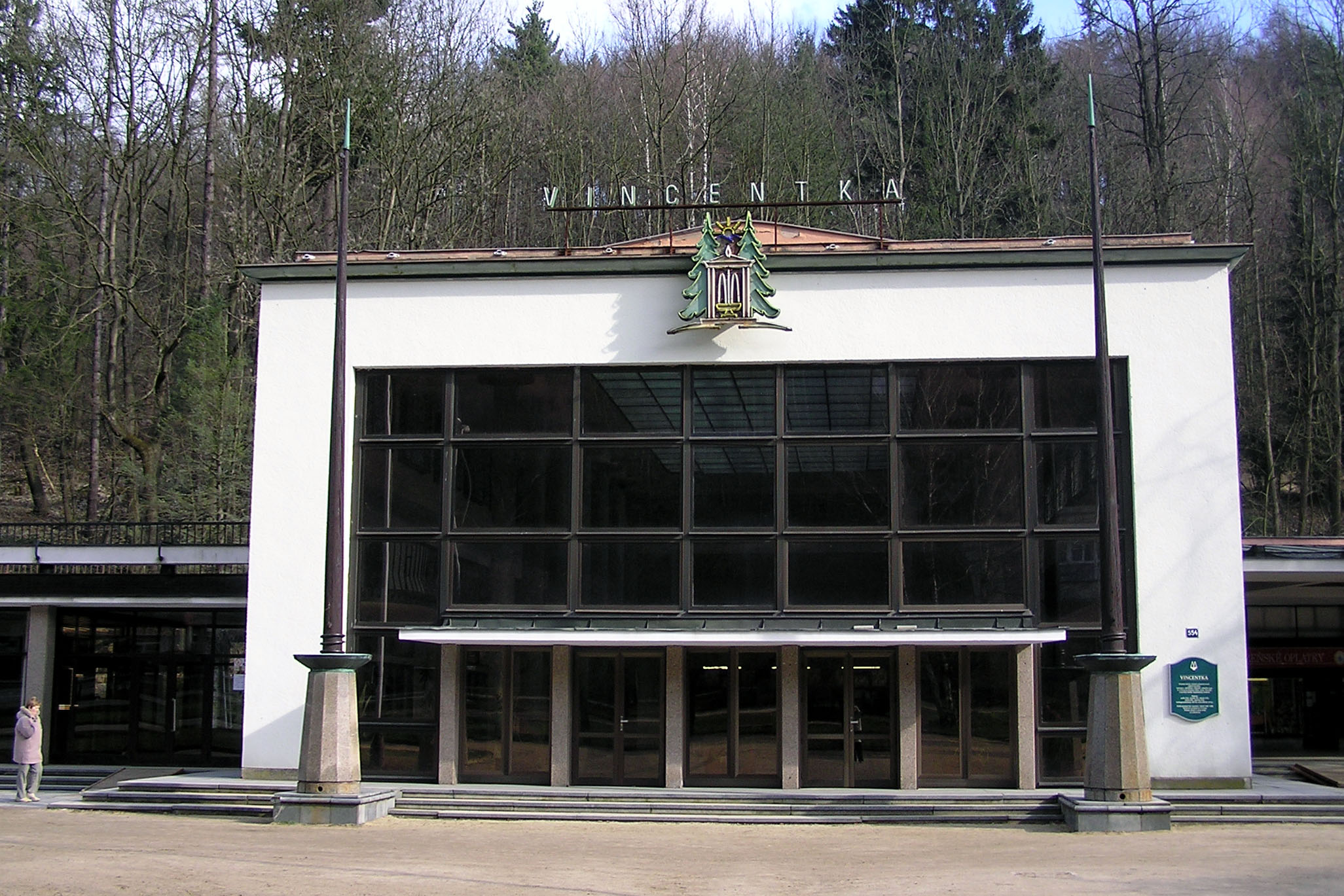 Luhačovice - pavilon Vincentka